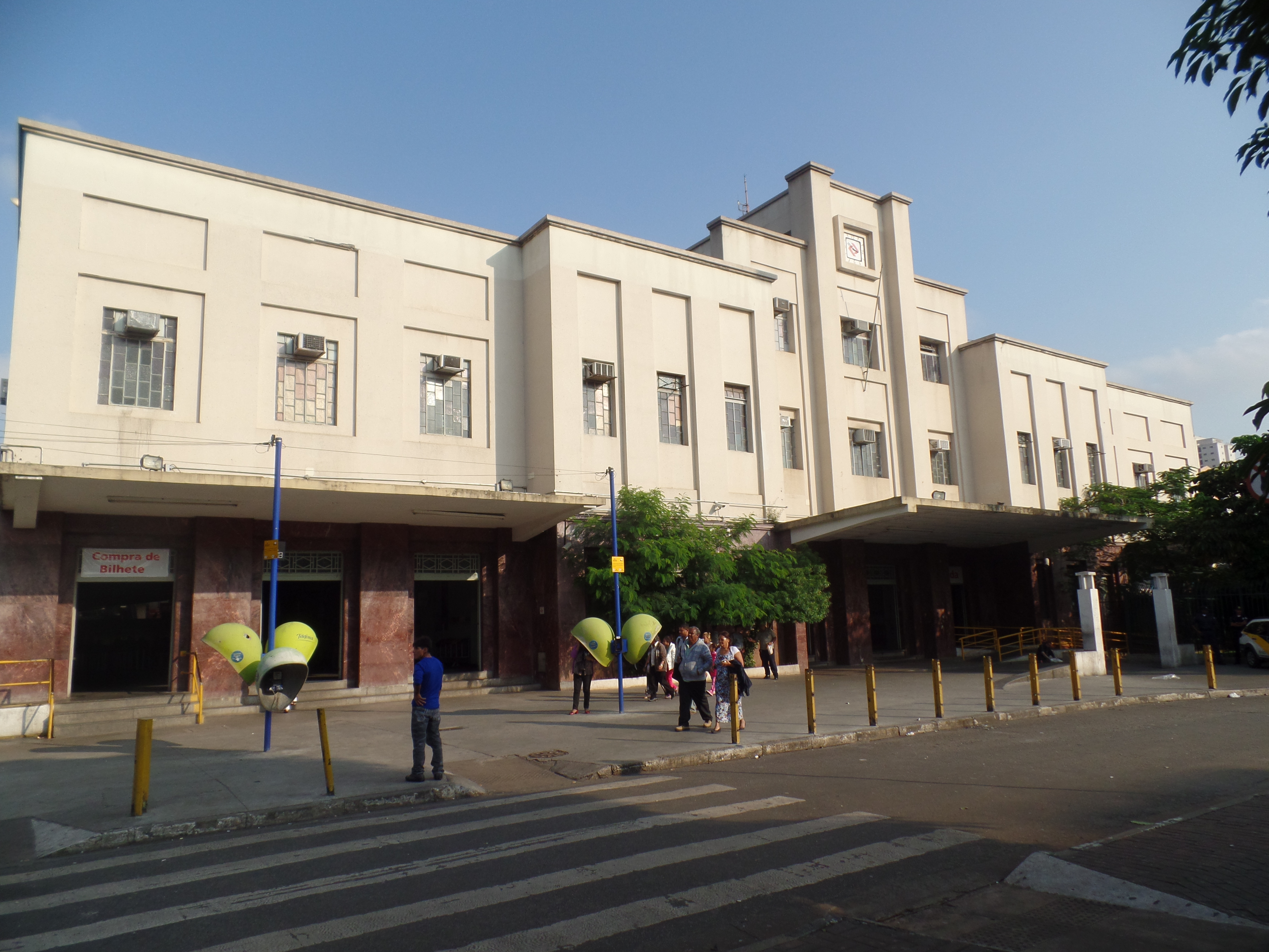 Brás, São Paulo - State of São Paulo, Brazil